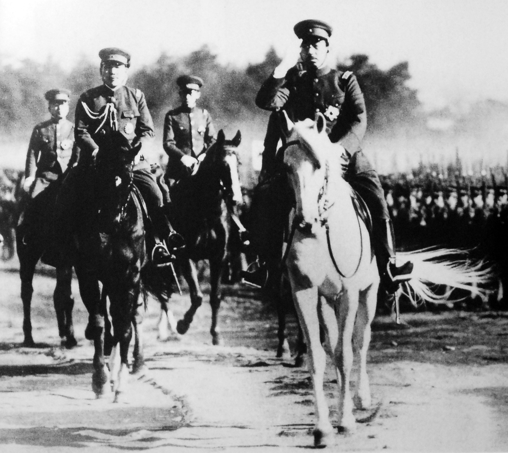 陸軍始観兵式で「白雪」号にまたがり閲兵を行なう昭和天皇。